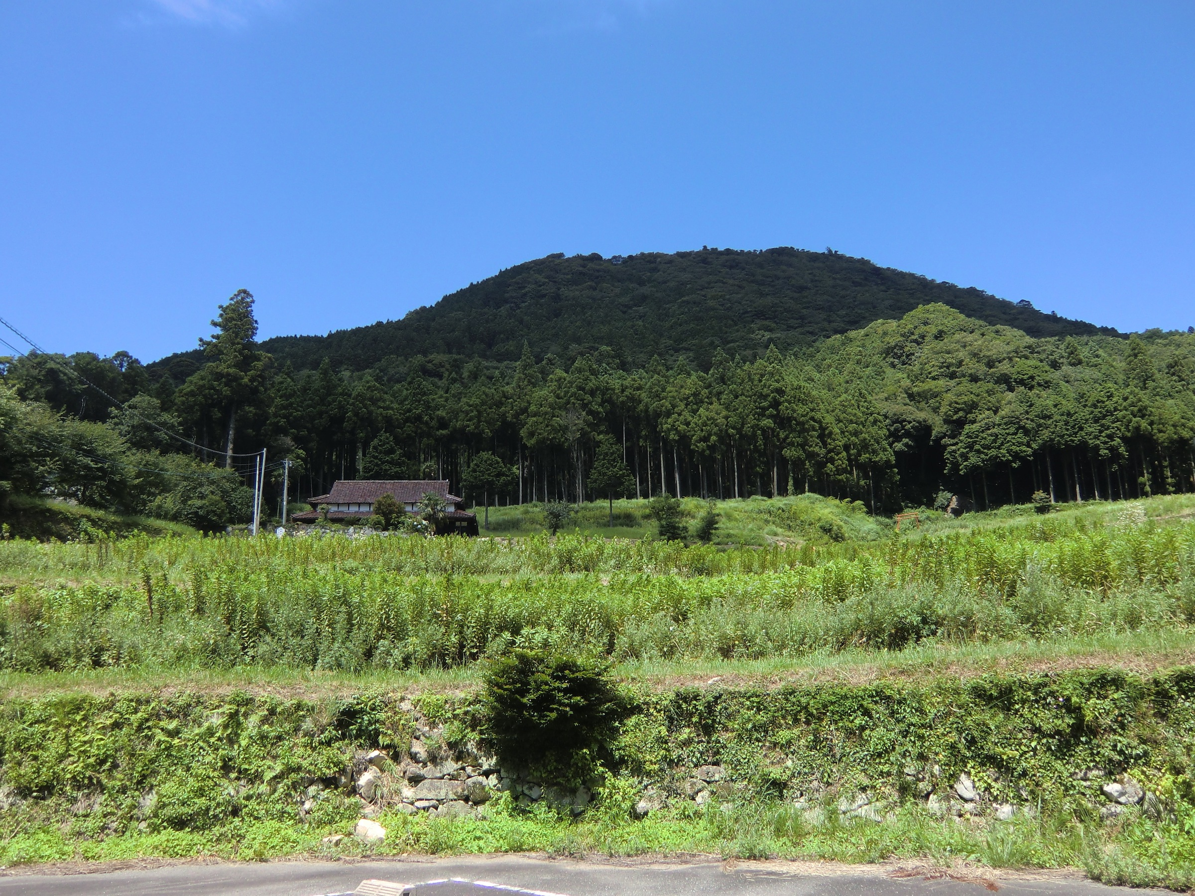 荒滝山（荒滝山城跡）の遠景（宇部市）